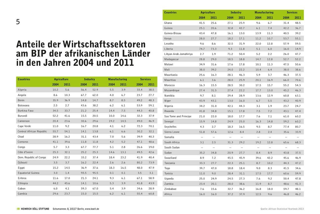 "Anteile der Wirtschaftssektoren am BIP der afrikanischen Länder in den Jahren 2004 und 2011" Serie: Infografiken der Heinrich Böll Stiftung zu Afrikas Wirtschaften vom 25. Feb. 2014